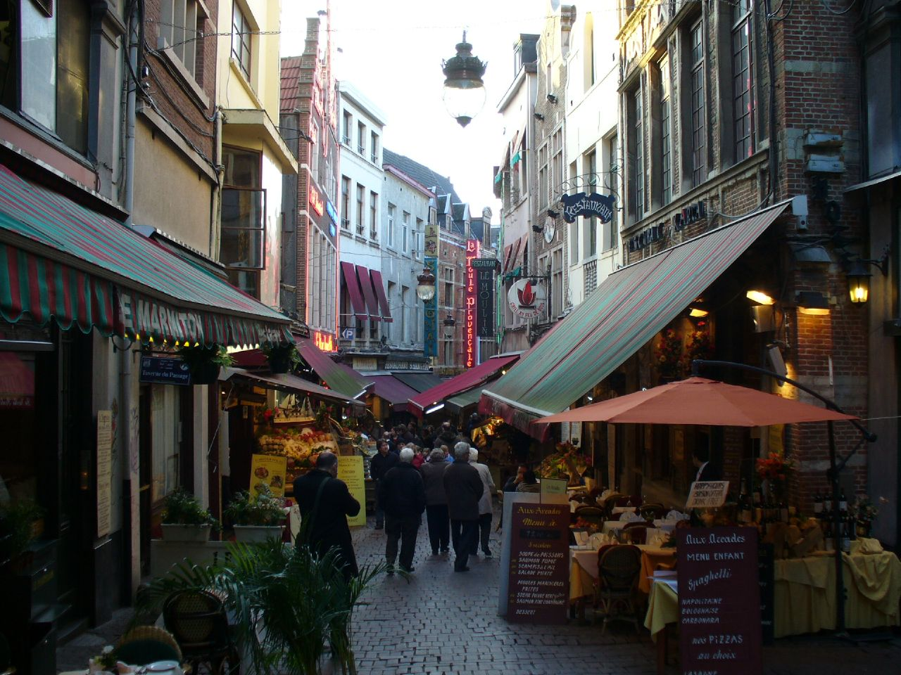 Centro de Bruxelas